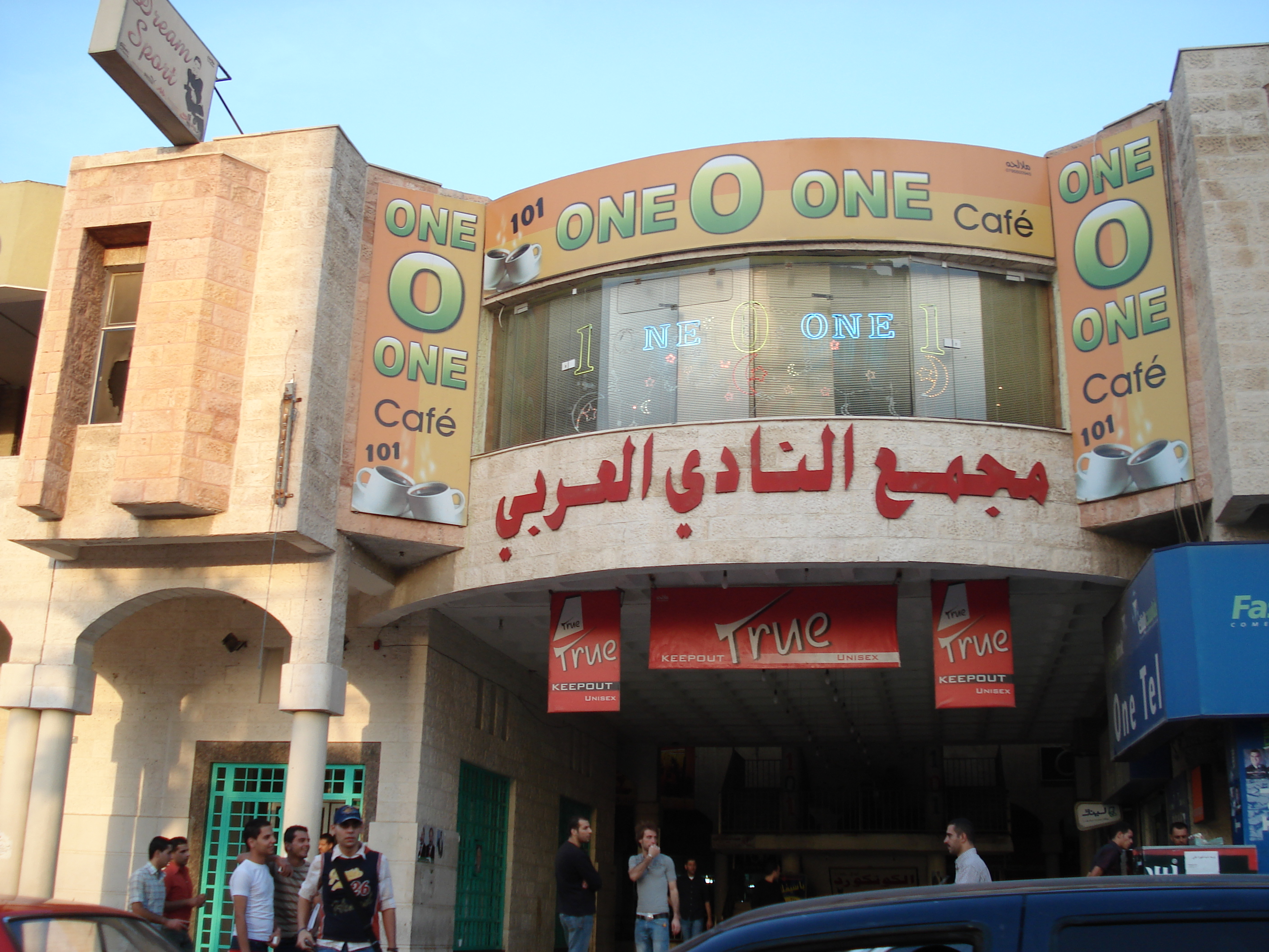 مجمع النادي العربي